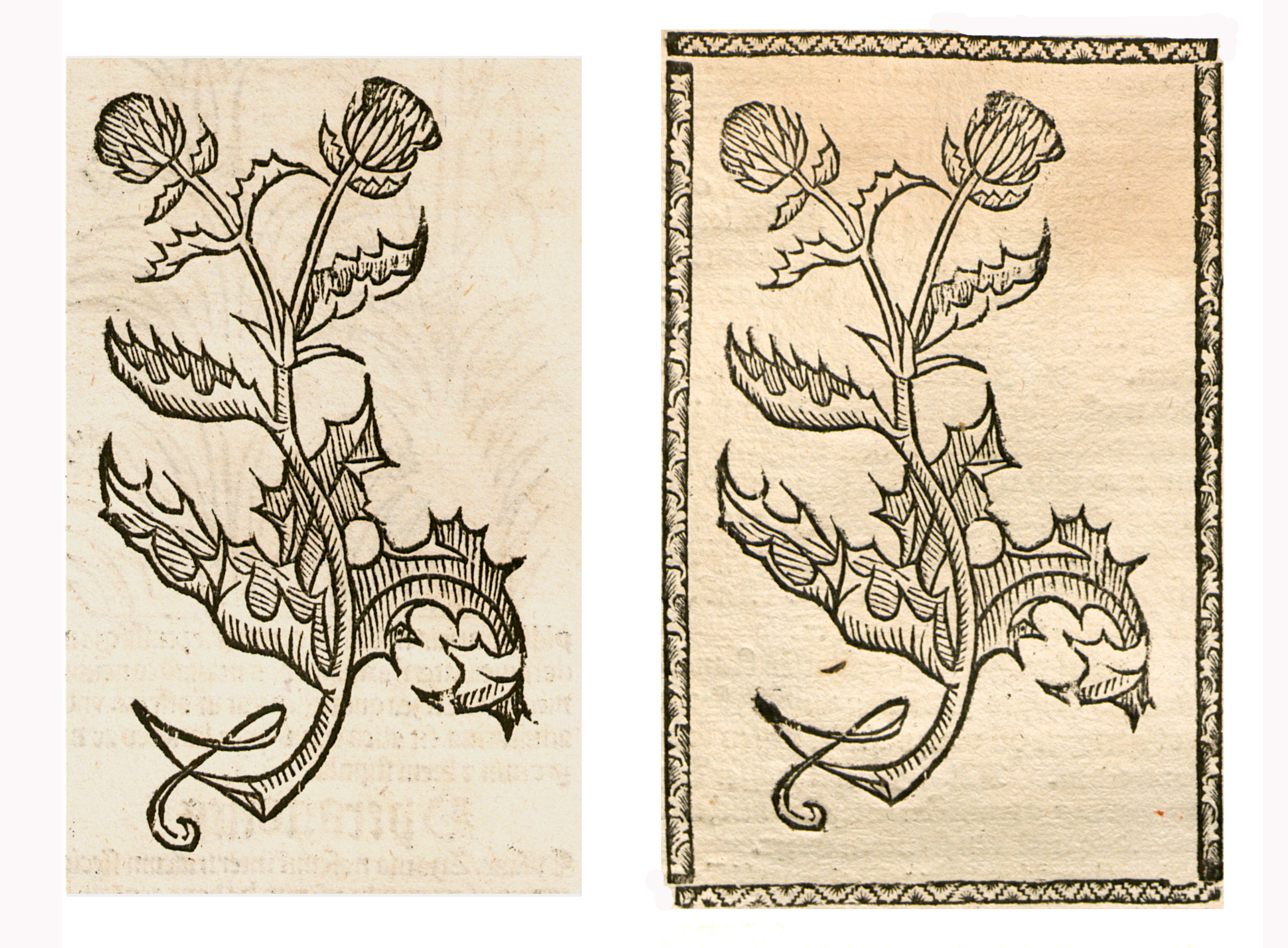 Abbildung von: Fe Distel (Silybium marianum)